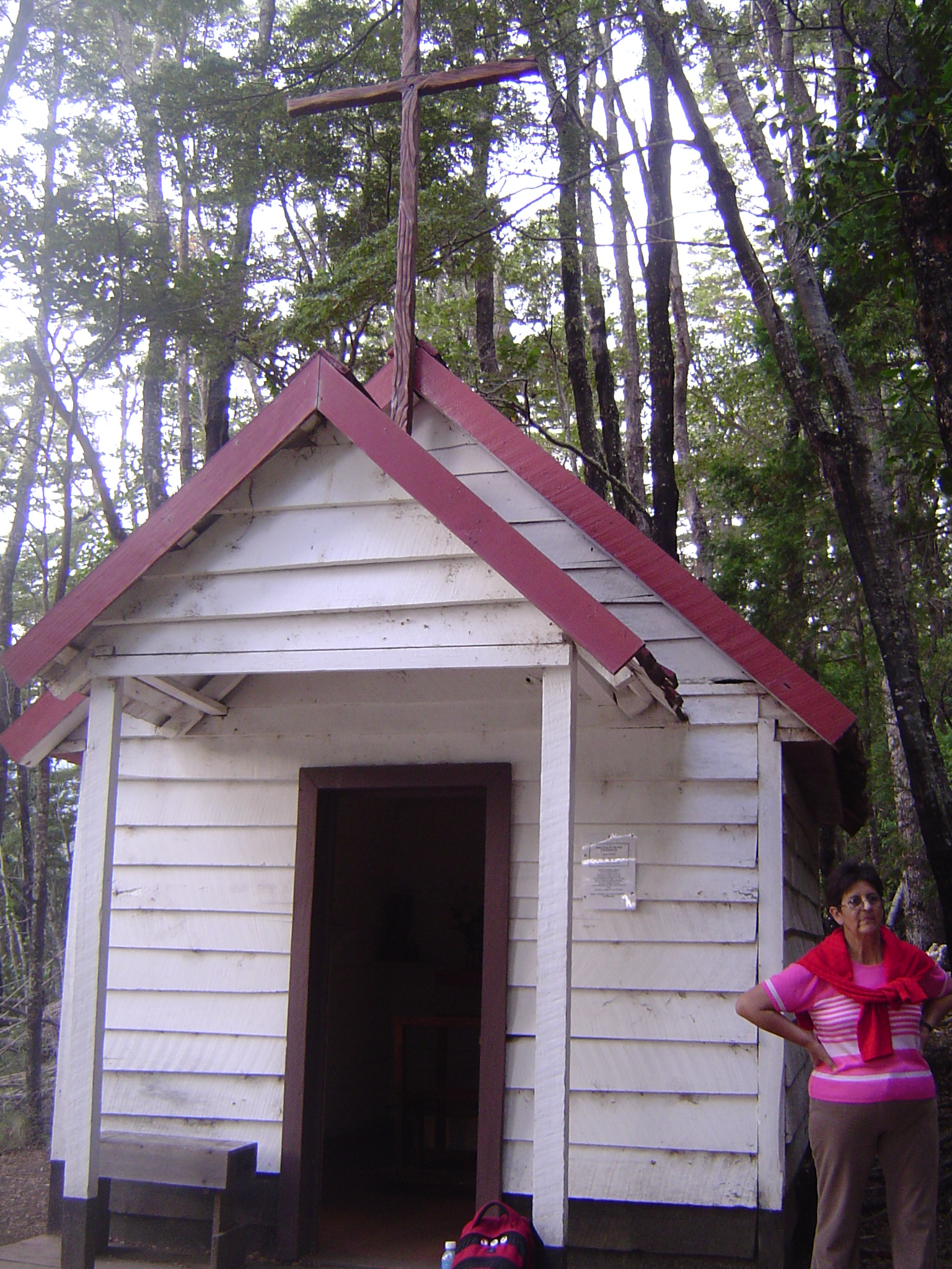 Capilla Santa Teresita. Lago Lácar